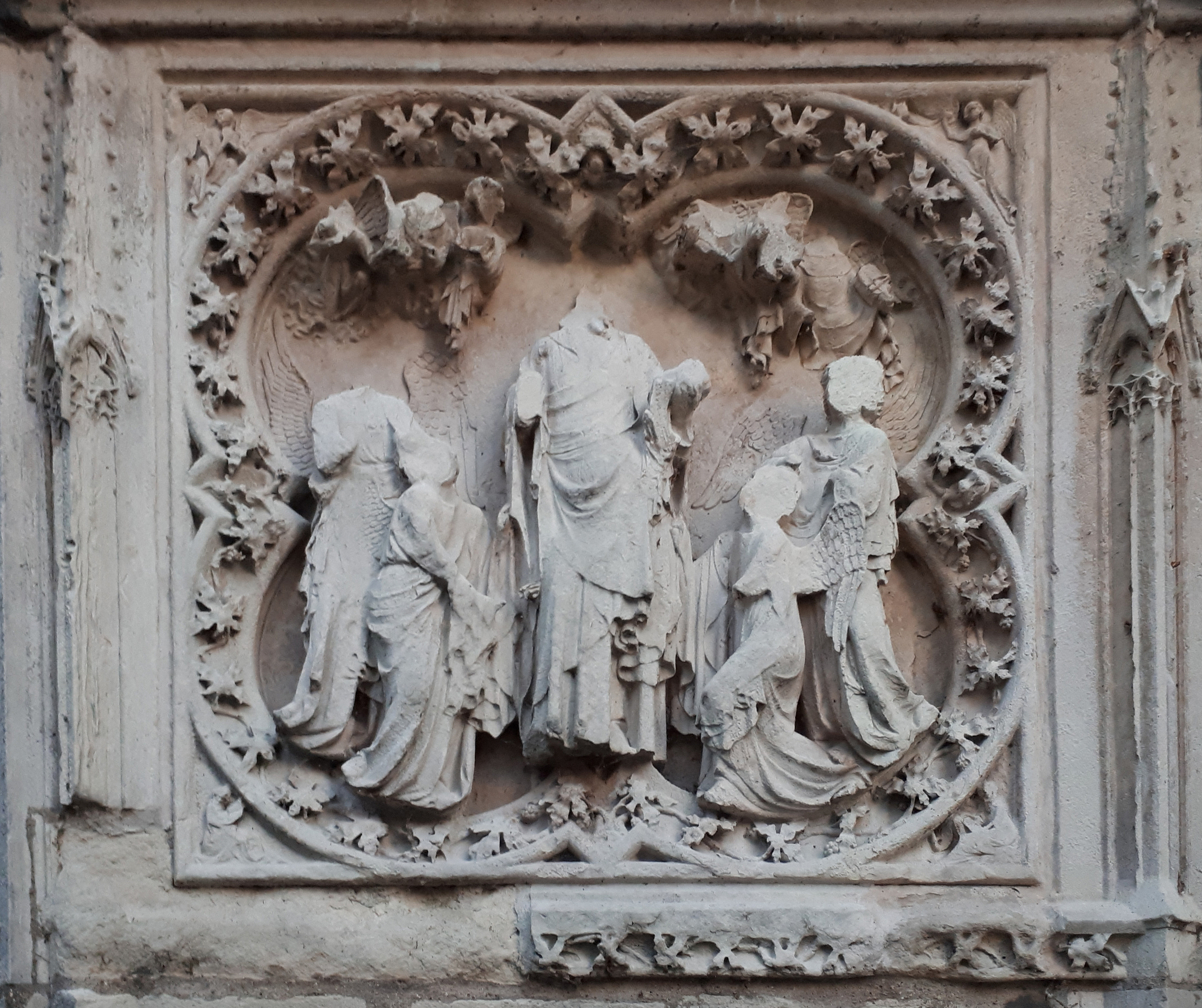 Glorificazione della Vergine o di Cristo risorto.